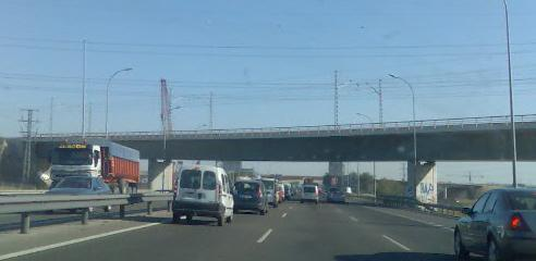 Viaducto sobre la A4